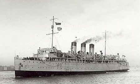 Der britische Minenleger Princess Margaret